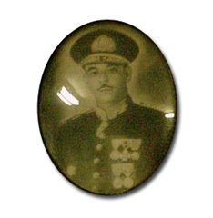 Marechal Governador Senador Alexandre Zacharias de Assumpção